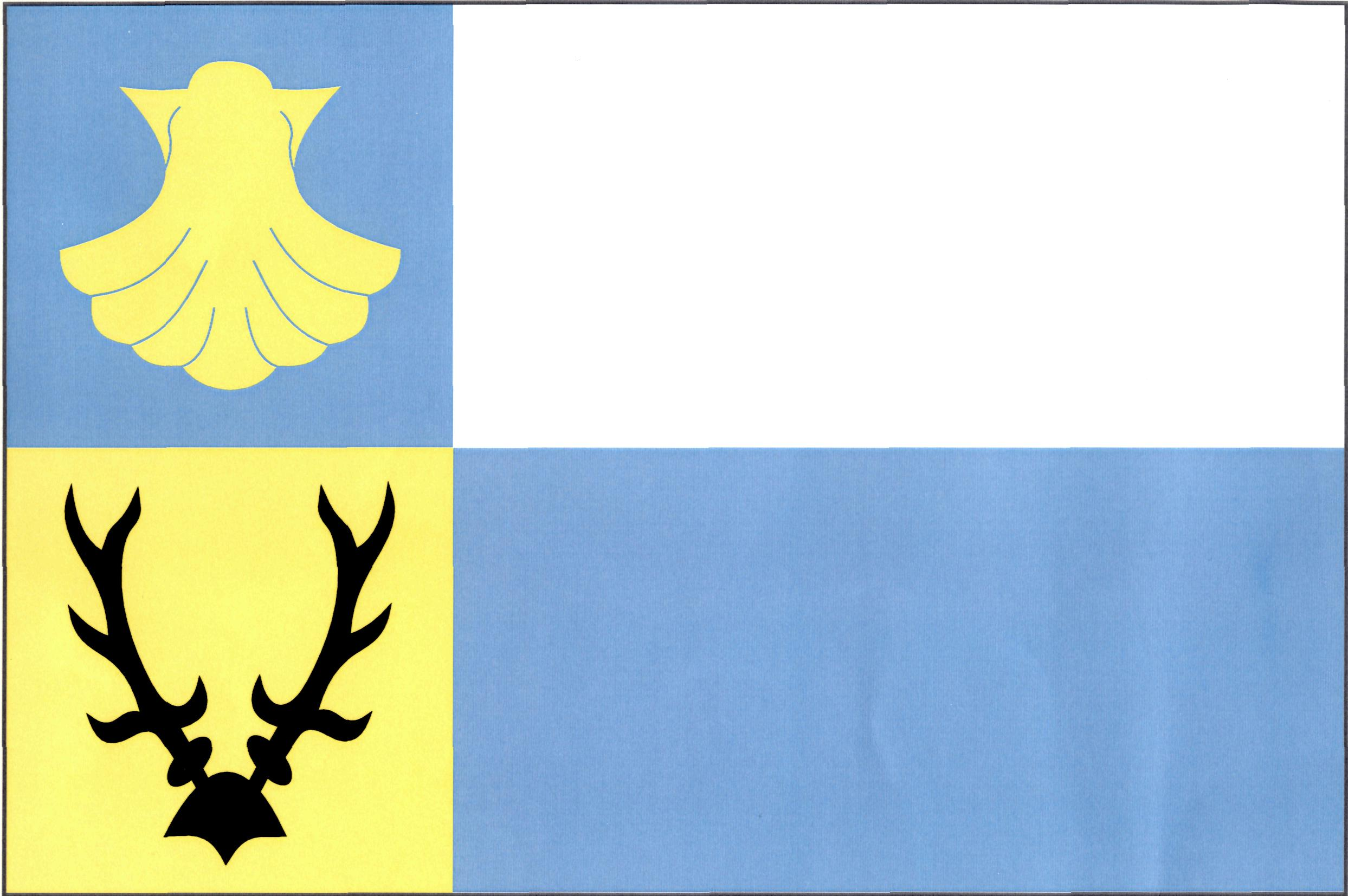 Vlajka obce Staňkov (okres Domažlice)